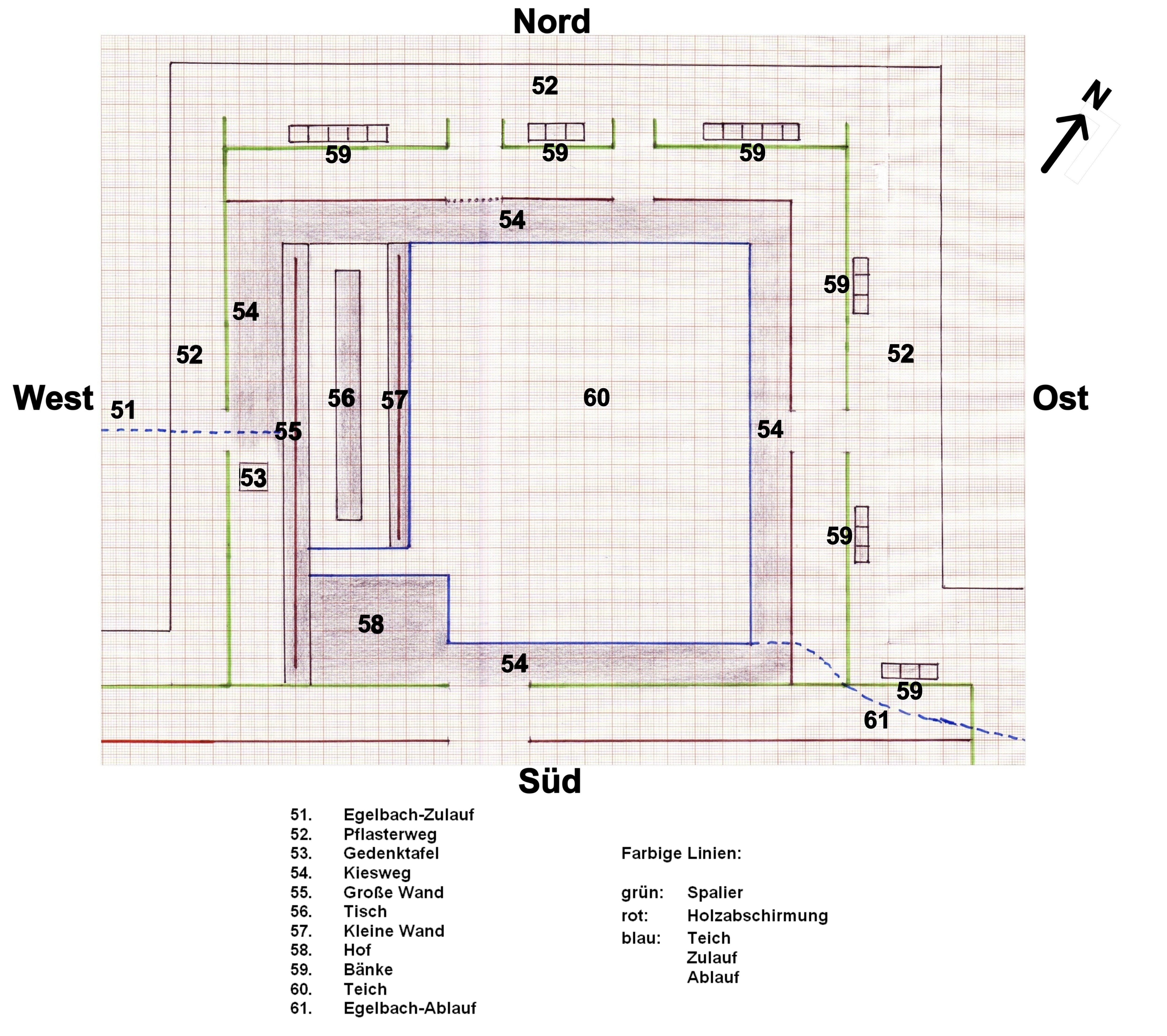 Grottenloch (Memorial Garden), Brunneninstallation von Michael Singer auf dem Wartberggelände in Stuttgart, Schemaplan (nicht positions- und maßstabgetreu).